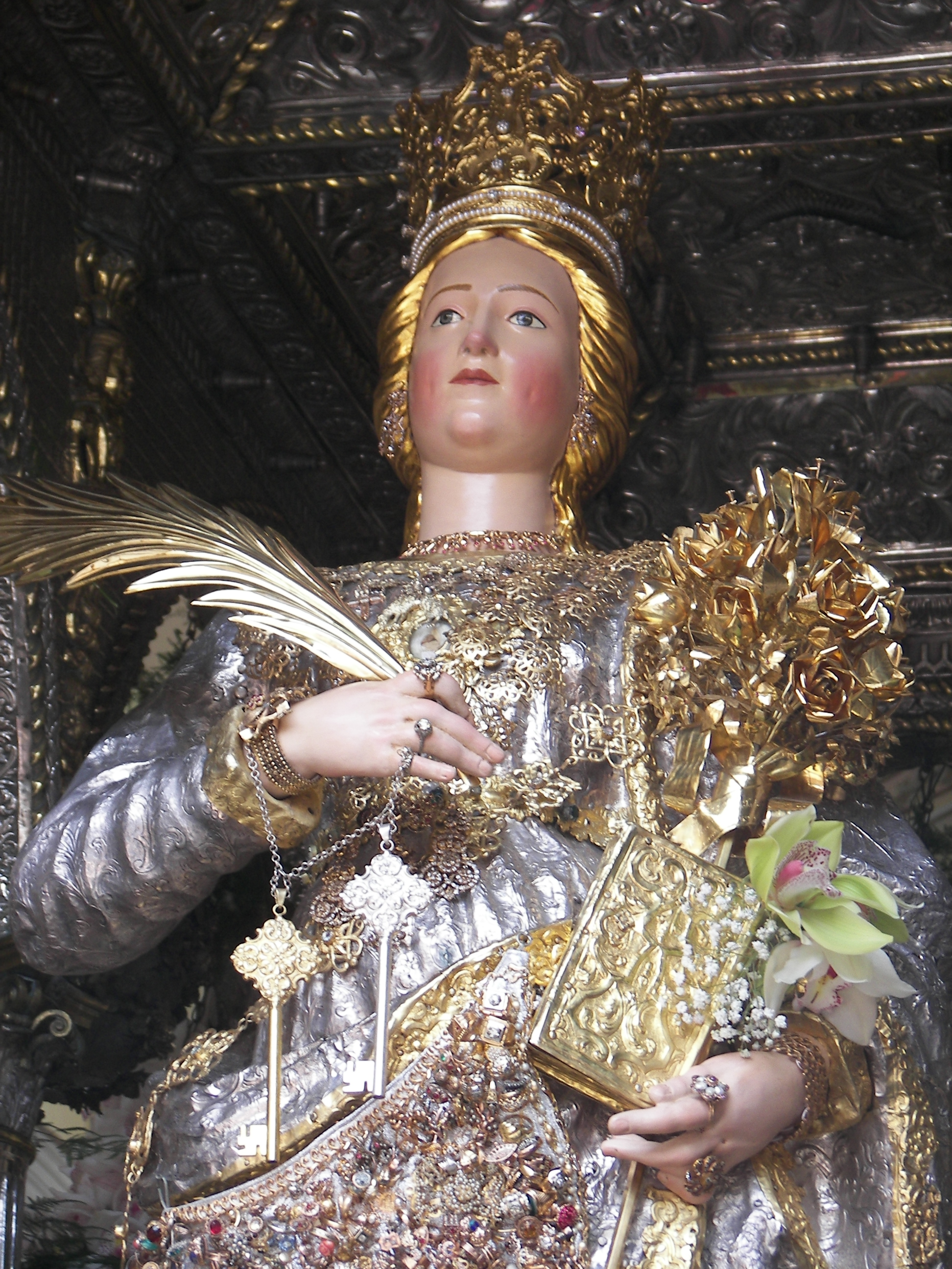 Artistico simulacro argenteo di Santa Barbara, venerato a Paternò (Ct). Autore della foto: Riccardo Spoto.